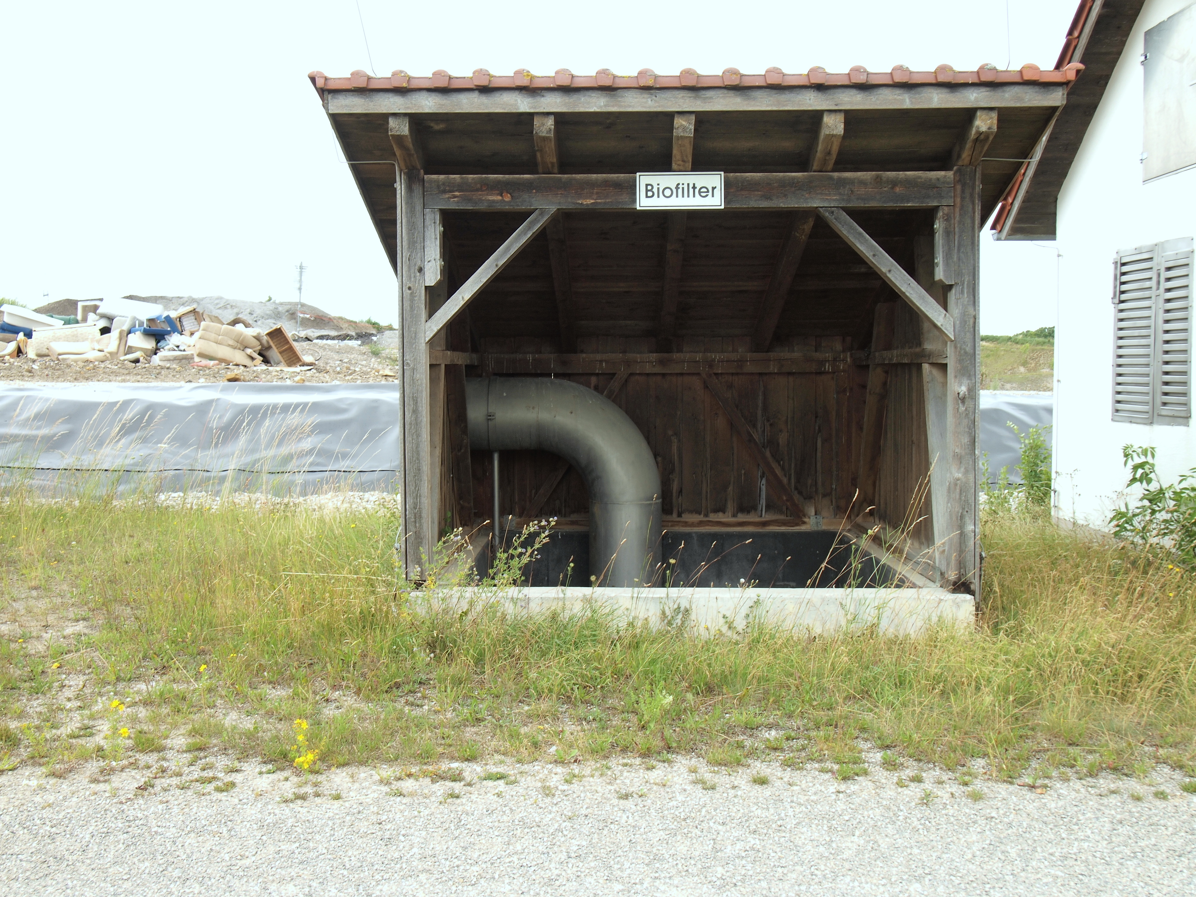 Hausmülldeponie Oberostendorf, Betriebsraum und Abluft Biofilter